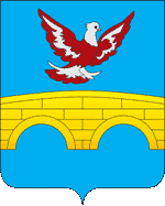 Герб города Благодарный Ставропольского края